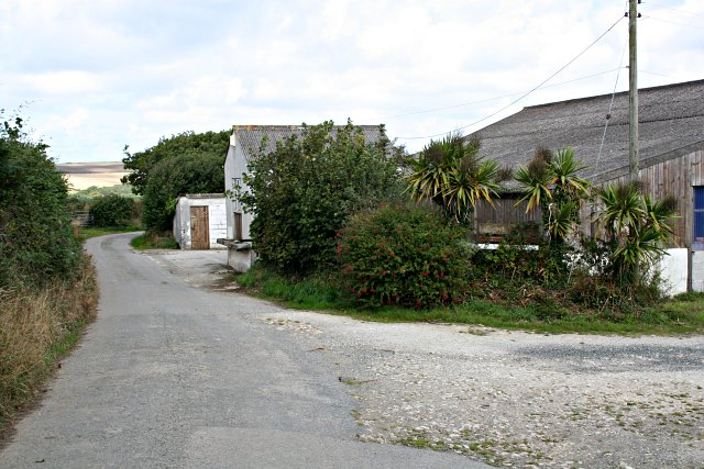 Bodanna Farm